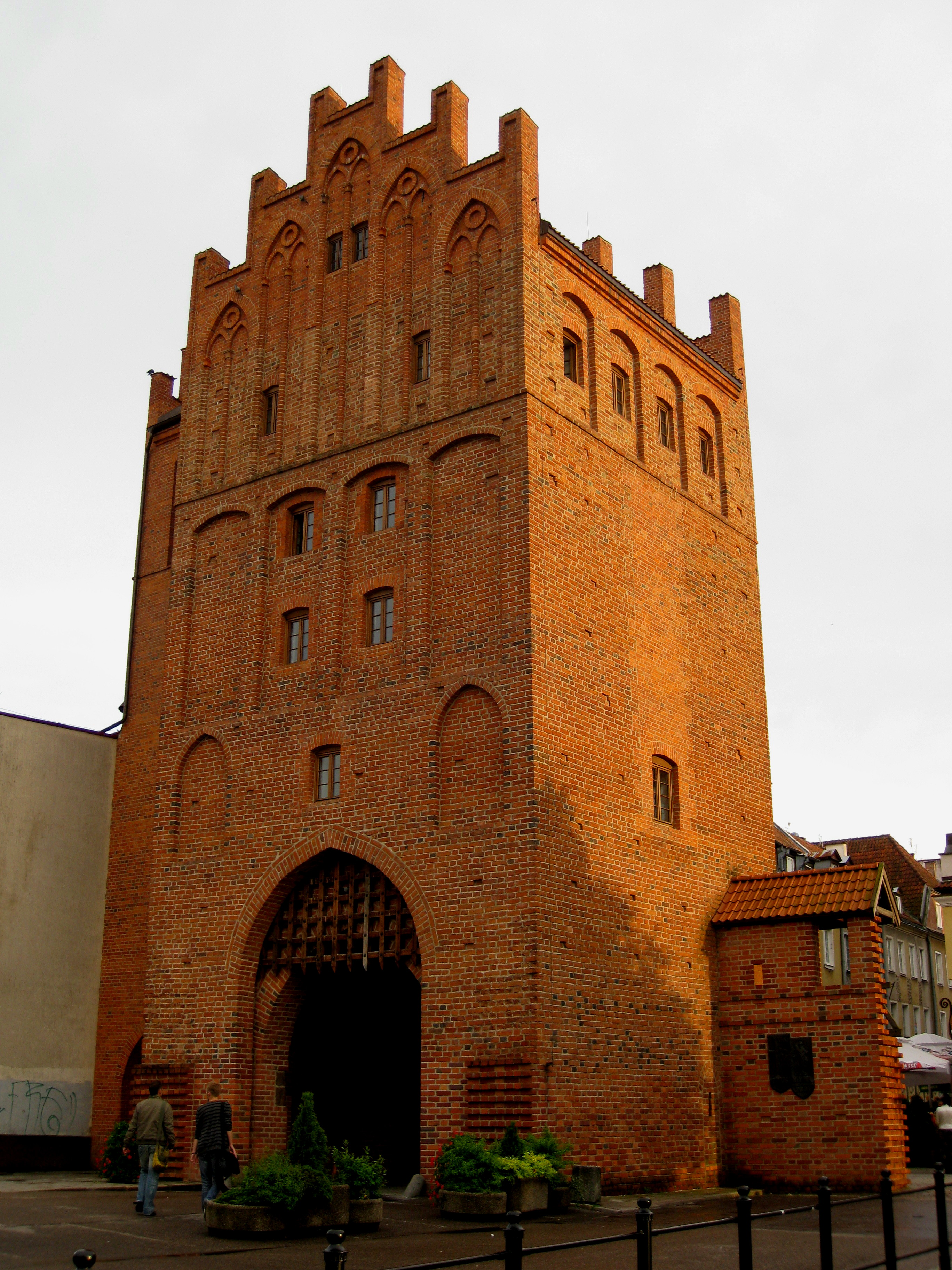 Das Hohe Tor (Olsztyn) in Olsztyn (Alleinstein)